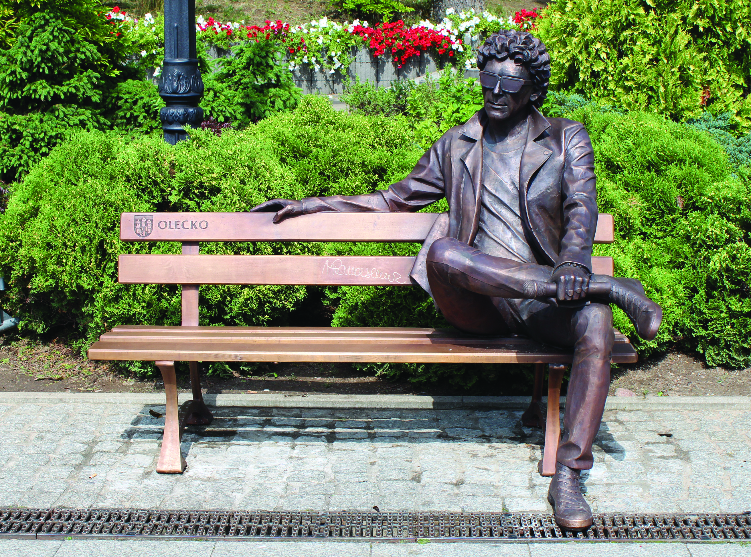 Ławeczka Janusza Panasewicza w Olecku (autor rzeźby- Michał Selerowski)